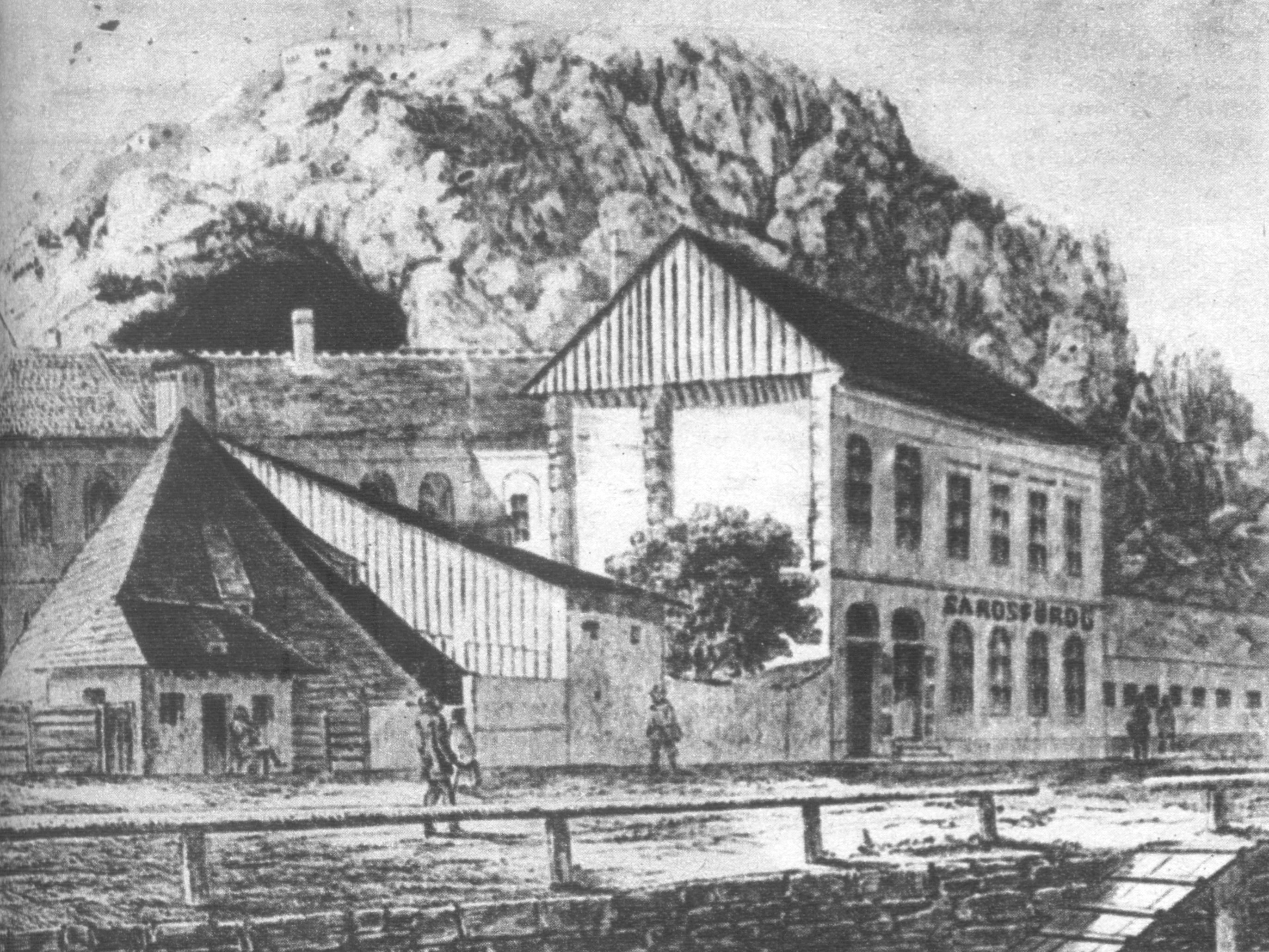 Sárosfürdő a XVII. században. Helyére épült a Gellért gyógyfürdő